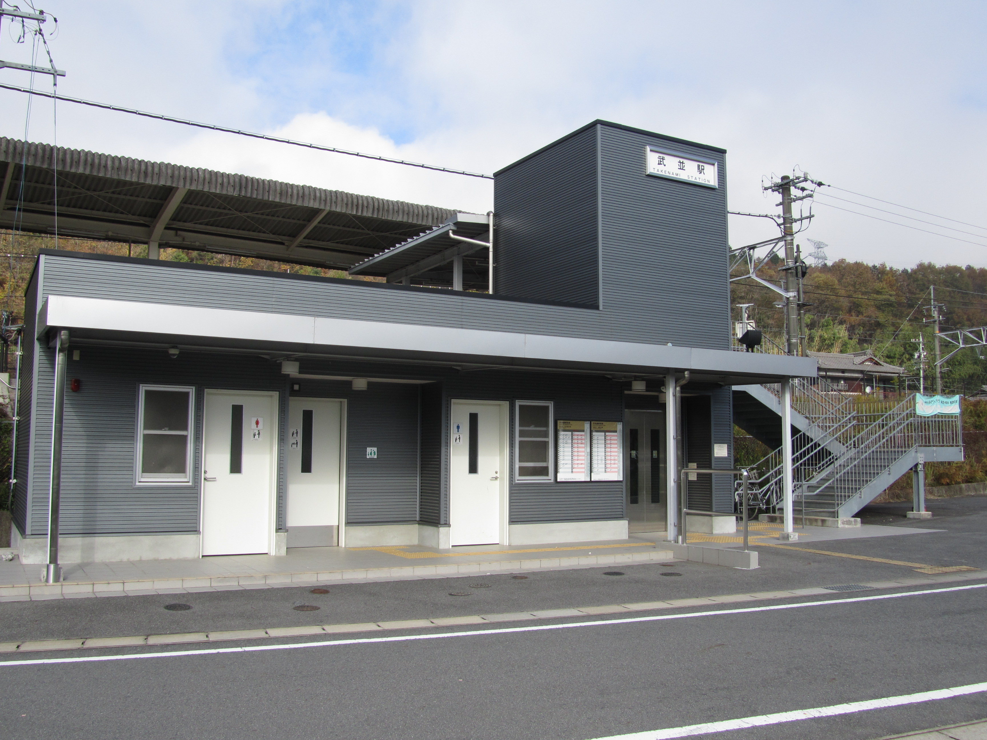 JR東海 中央本線武並駅南口（2008年設置）